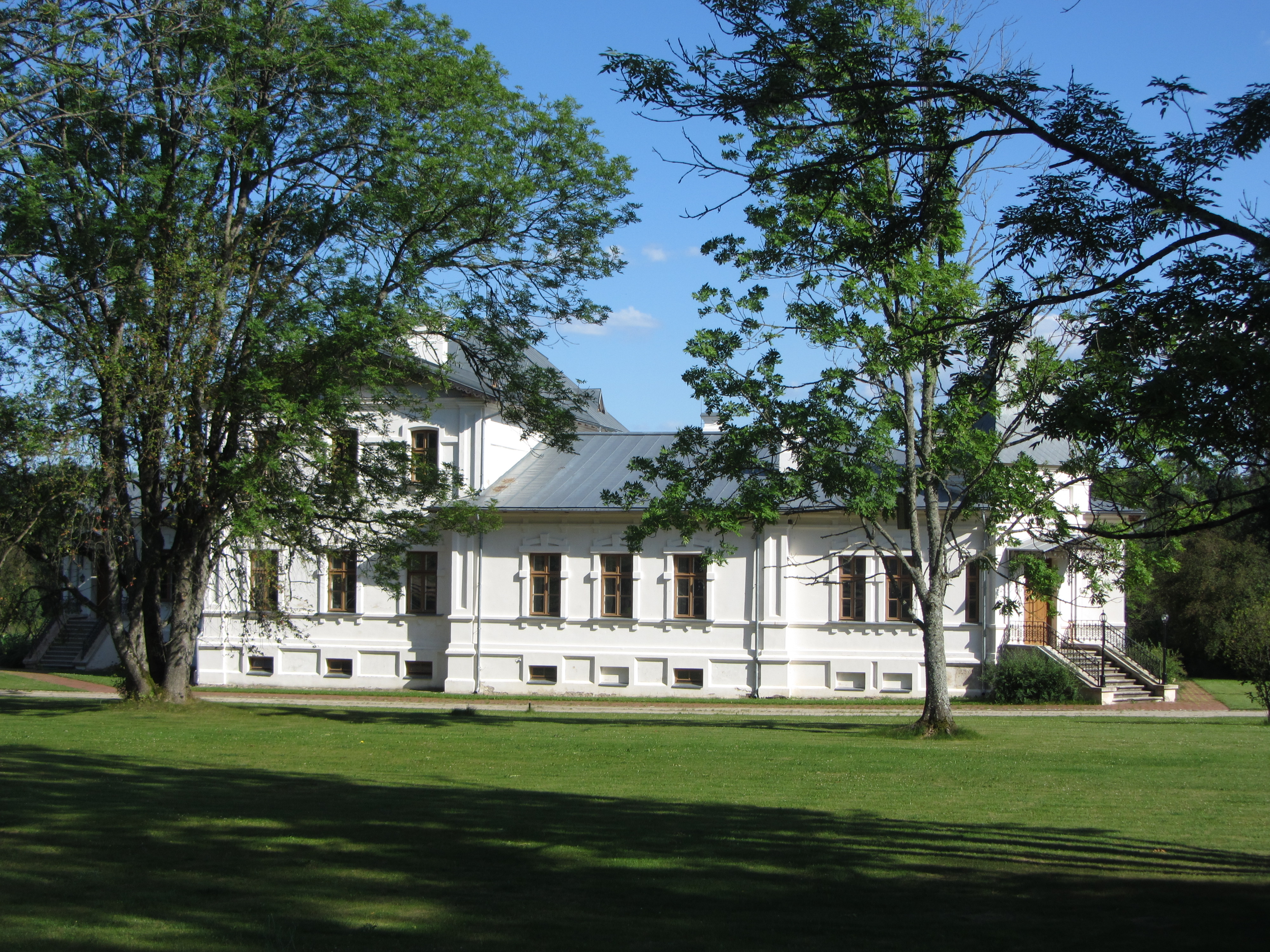 Zibalų sen., Lithuania